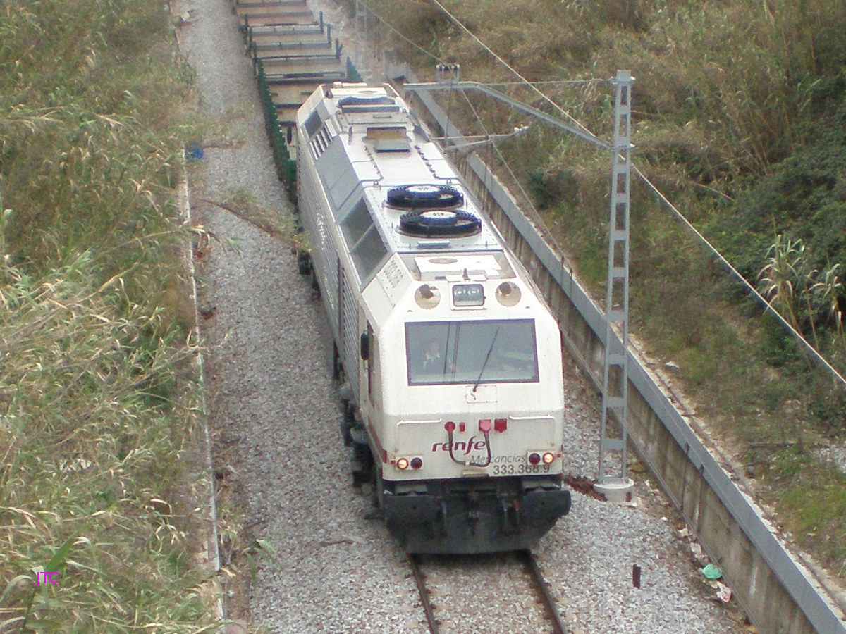 La locomotora 333.368 circulando por la línea de Puigcerdà en Mollet del Vallès.